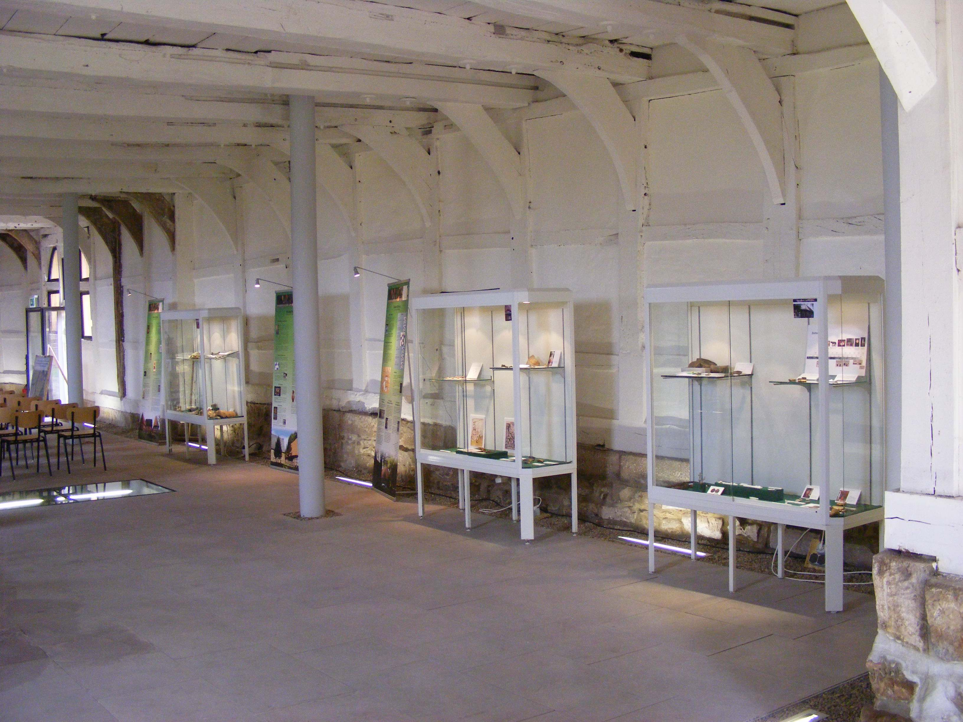 Die kleine Ausstellung informiert über die archäologischen Kampagnen 2009-2011.